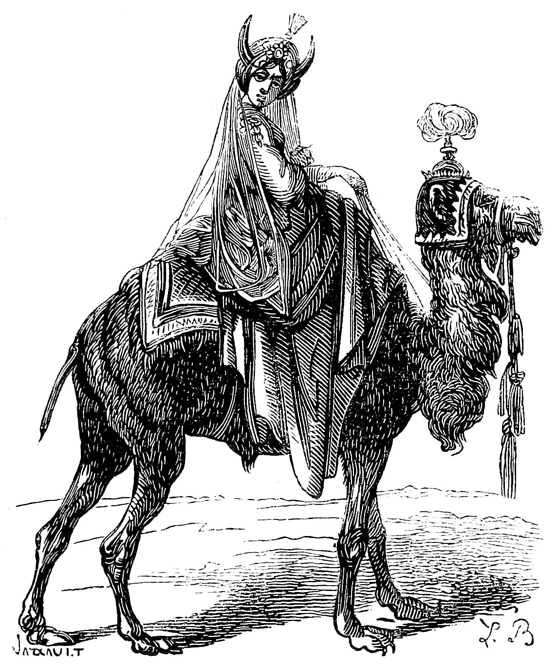 Illustration du Dictionnaire infernal de Jacques Auguste Simon Collin de Plancy par Louis Le Breton, 6eme édition, 1863.